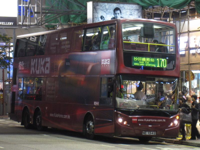 170九巴字軌車AVBE69 / NE1342於銅鑼灣怡和街，最近上掛剛打入香港市場的沙發品牌－－KUKA的全車身廣告